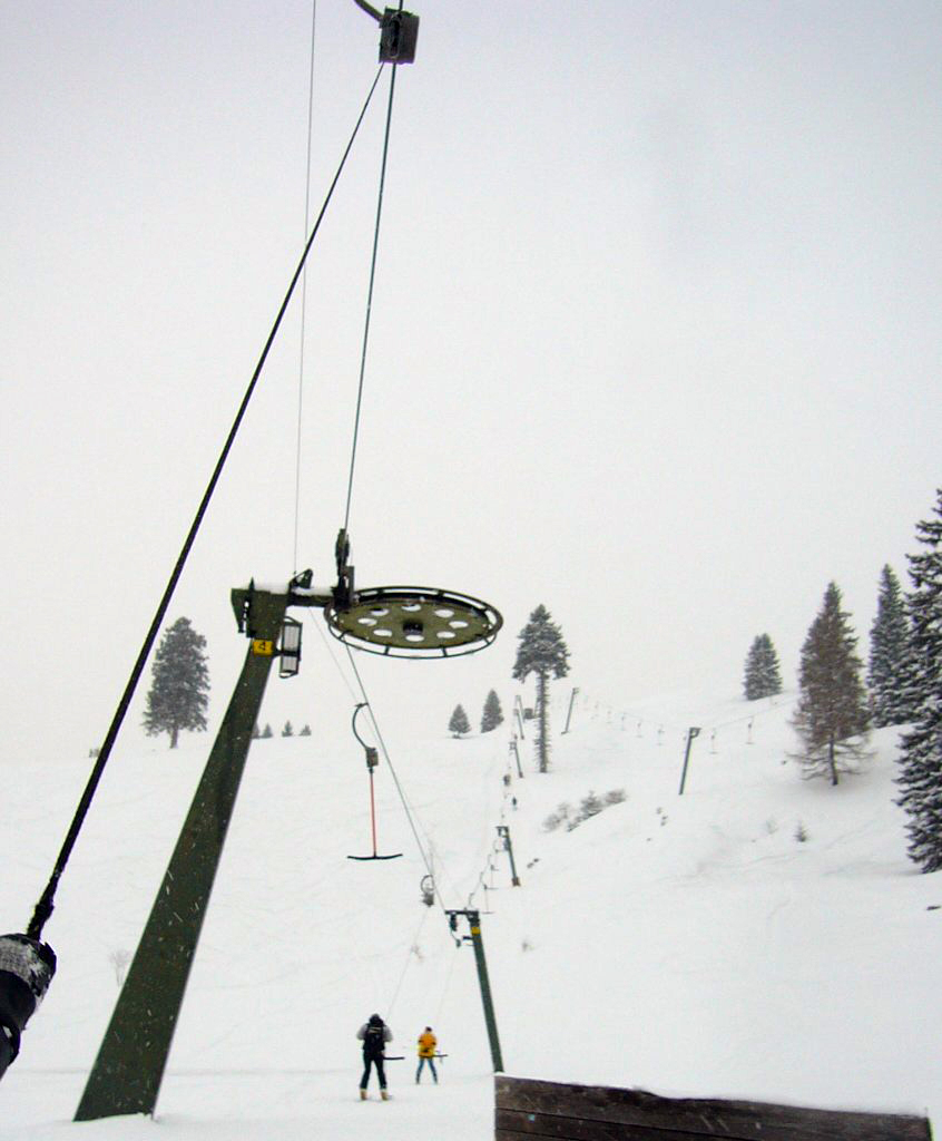 Umlenkrolle eines Schlepplift-Zugseils, Sudelfeld (Bayern).